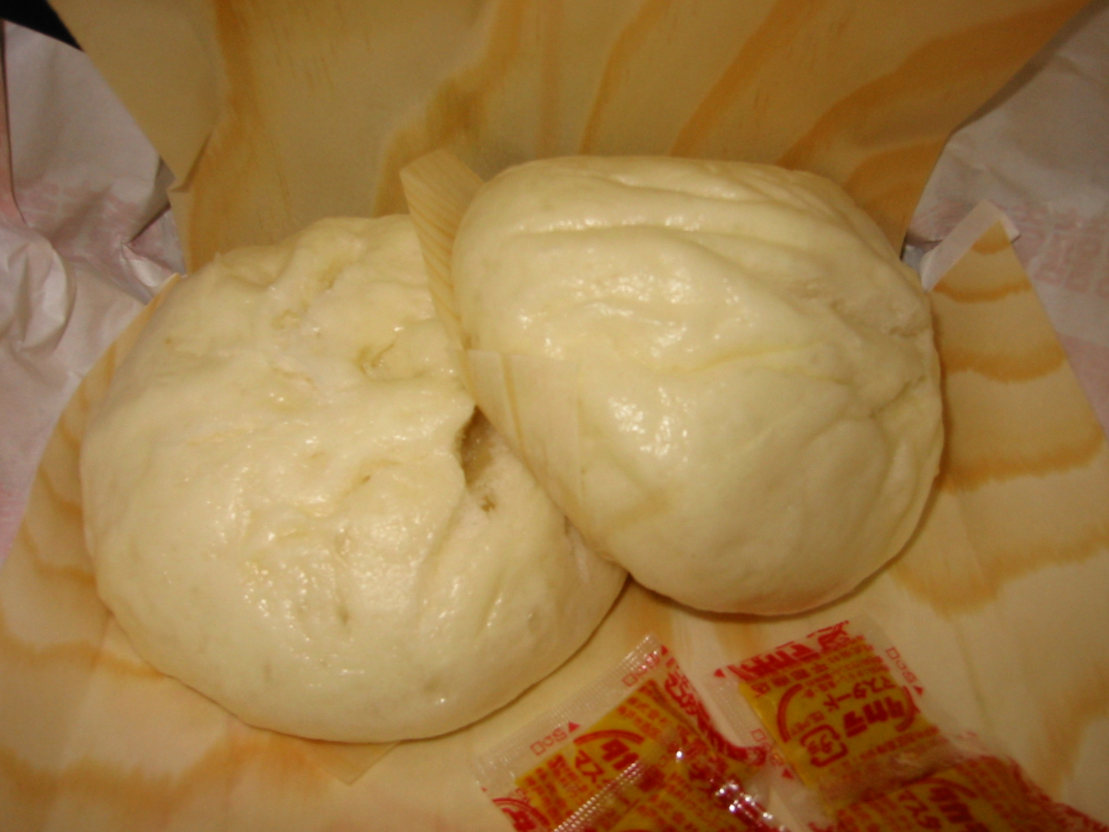 加古川四興楼の豚まん